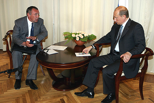 Владимир Путин, Владимир Чуб